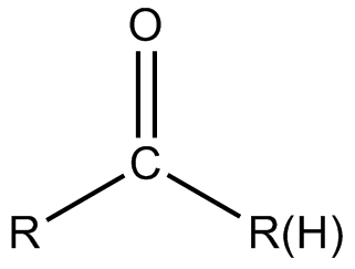 羰基